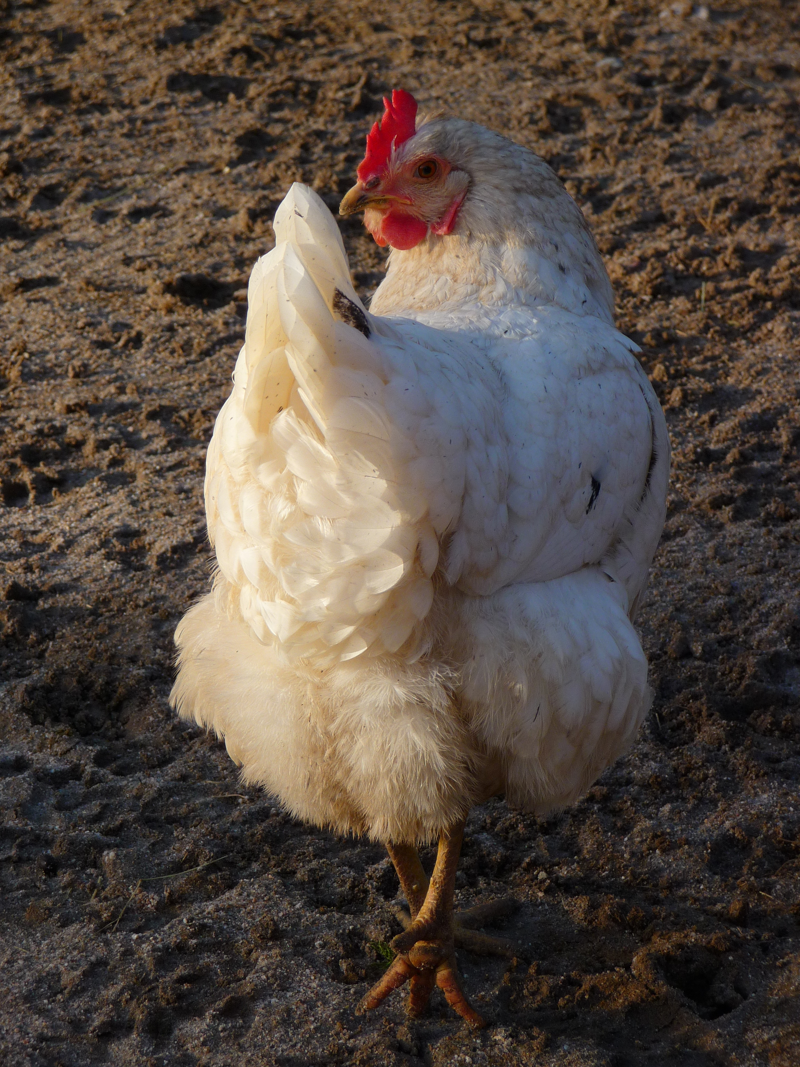 Haushuhn (Rasse mir unbekannt), fotografiert in Baden-Württemberg, Deutschland